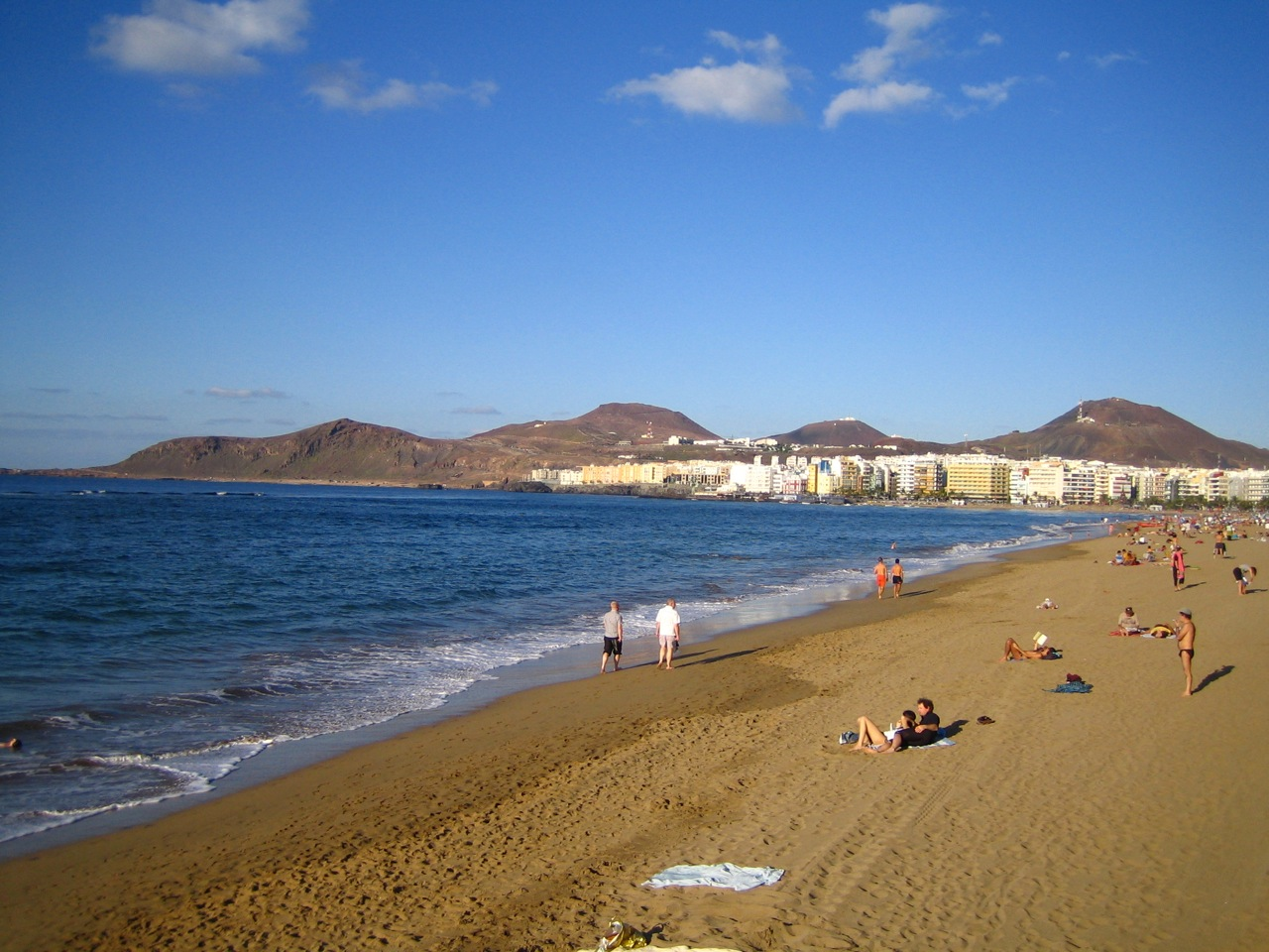 Vista de la Playa de Las Canteras tomada el 24 de diciembre de 2006. Las Palmas de gran Canaria.